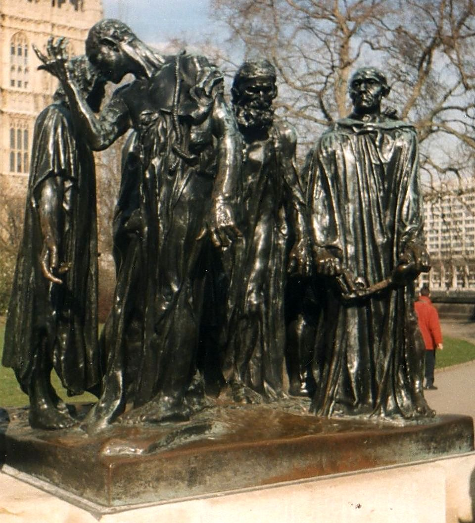 eigene Fotosammlung